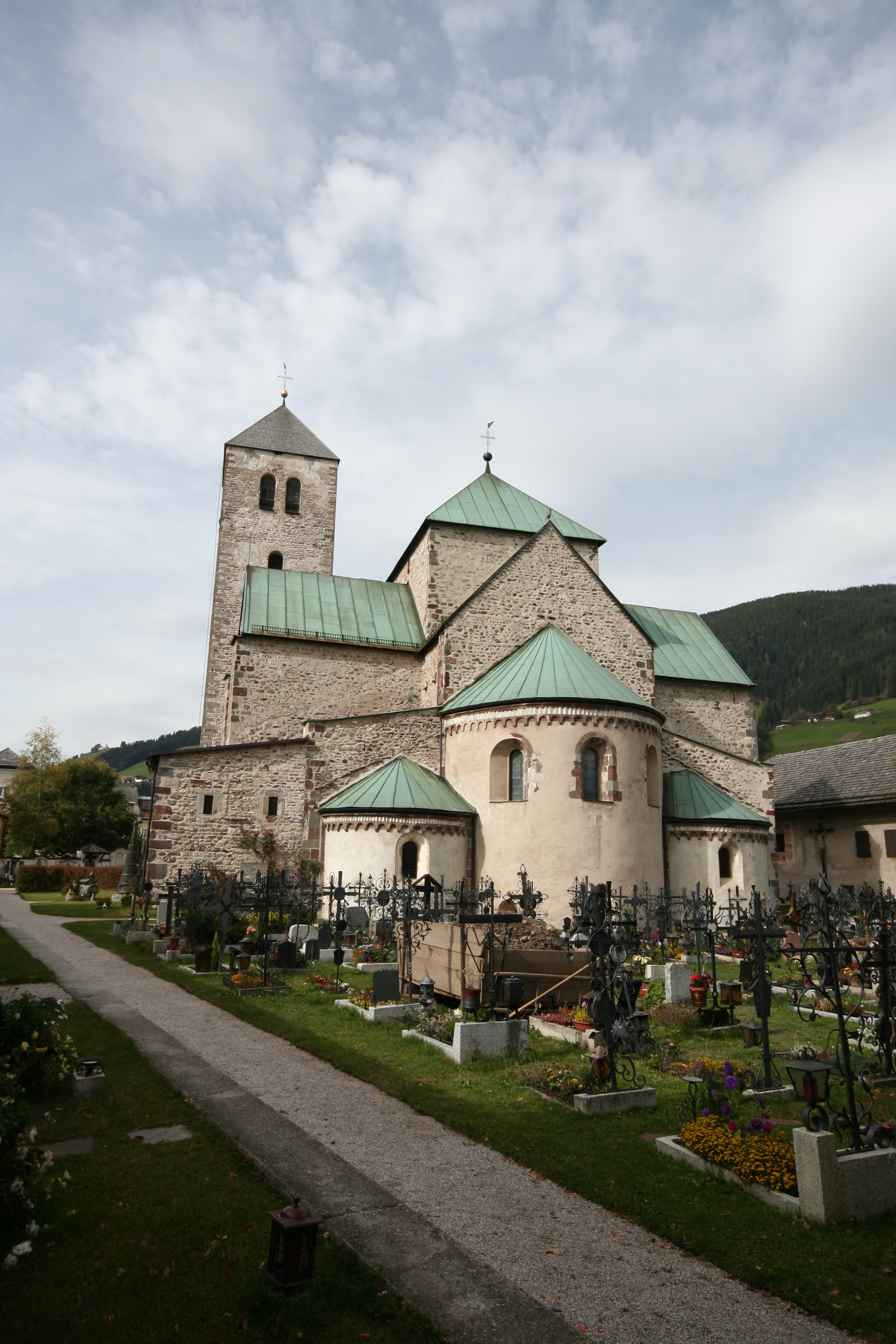 Stift Innichen, Ansicht von Hinten